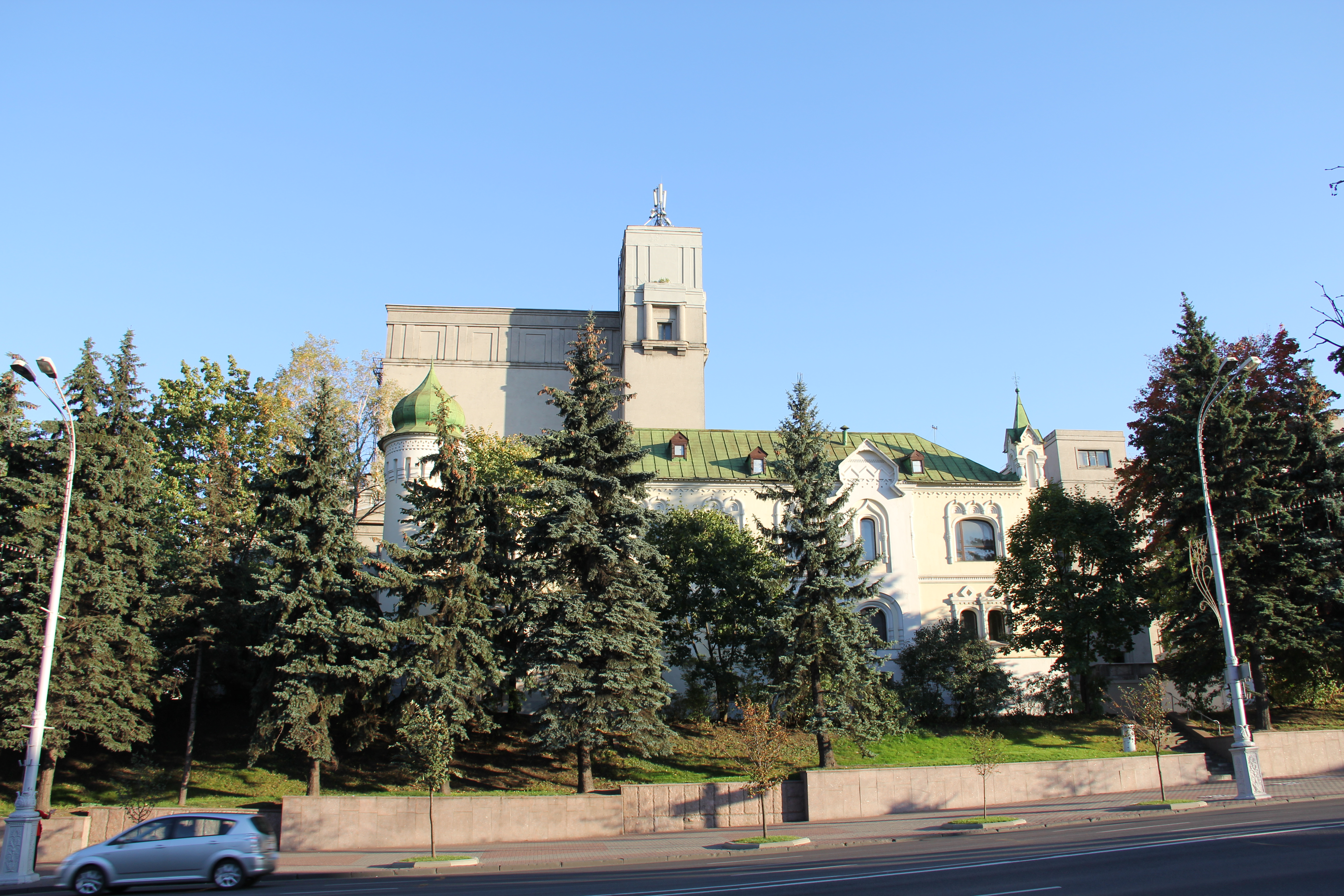 Беларуская (тарашкевіца): Адміністрацыйны будынак (былы царкоўна-археалягічны музэй). г. Менск This is a photo of Belarusian heritage monument. Reference number: 713Г000175 ( WLM)